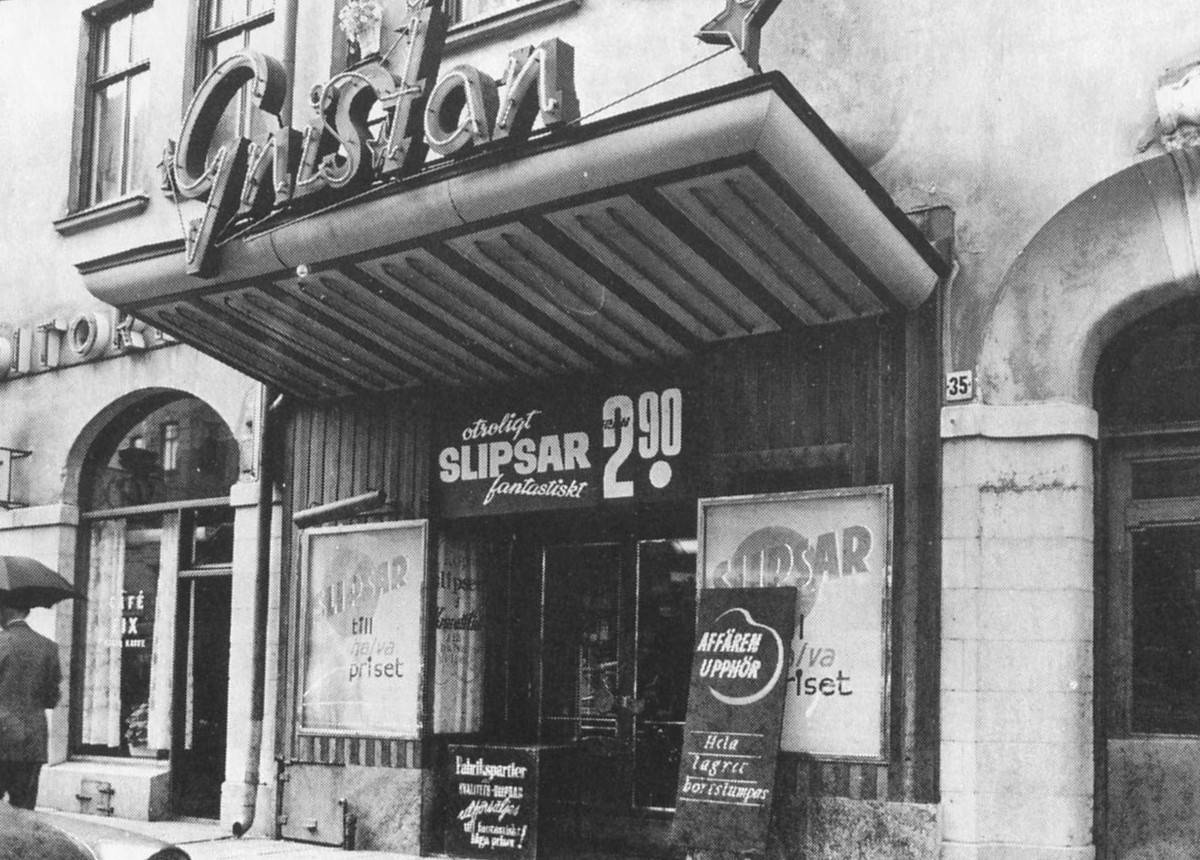 Biograf "Gnistan" på Kungsholmen efter nedläggningen